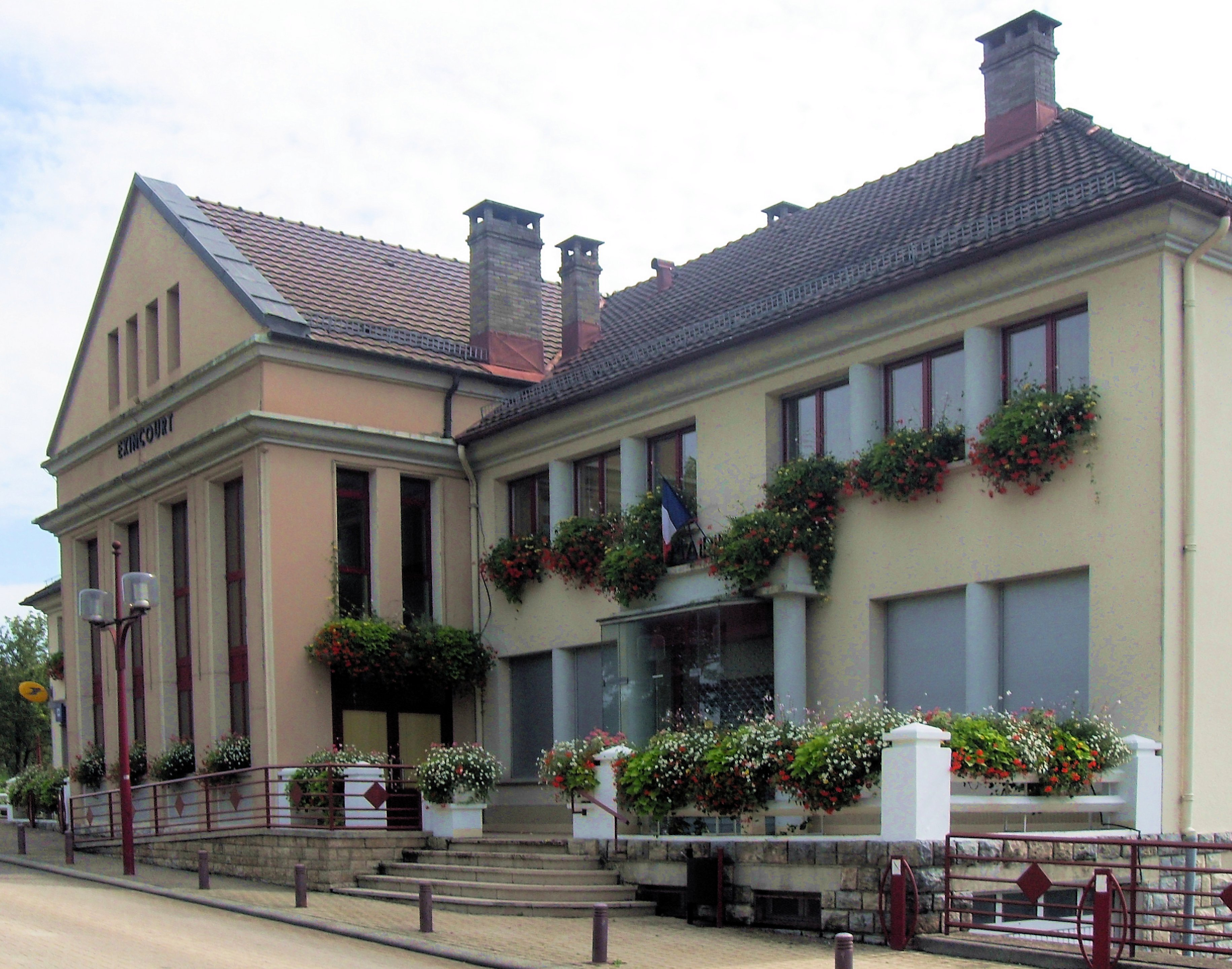 La mairie d'Exincourt